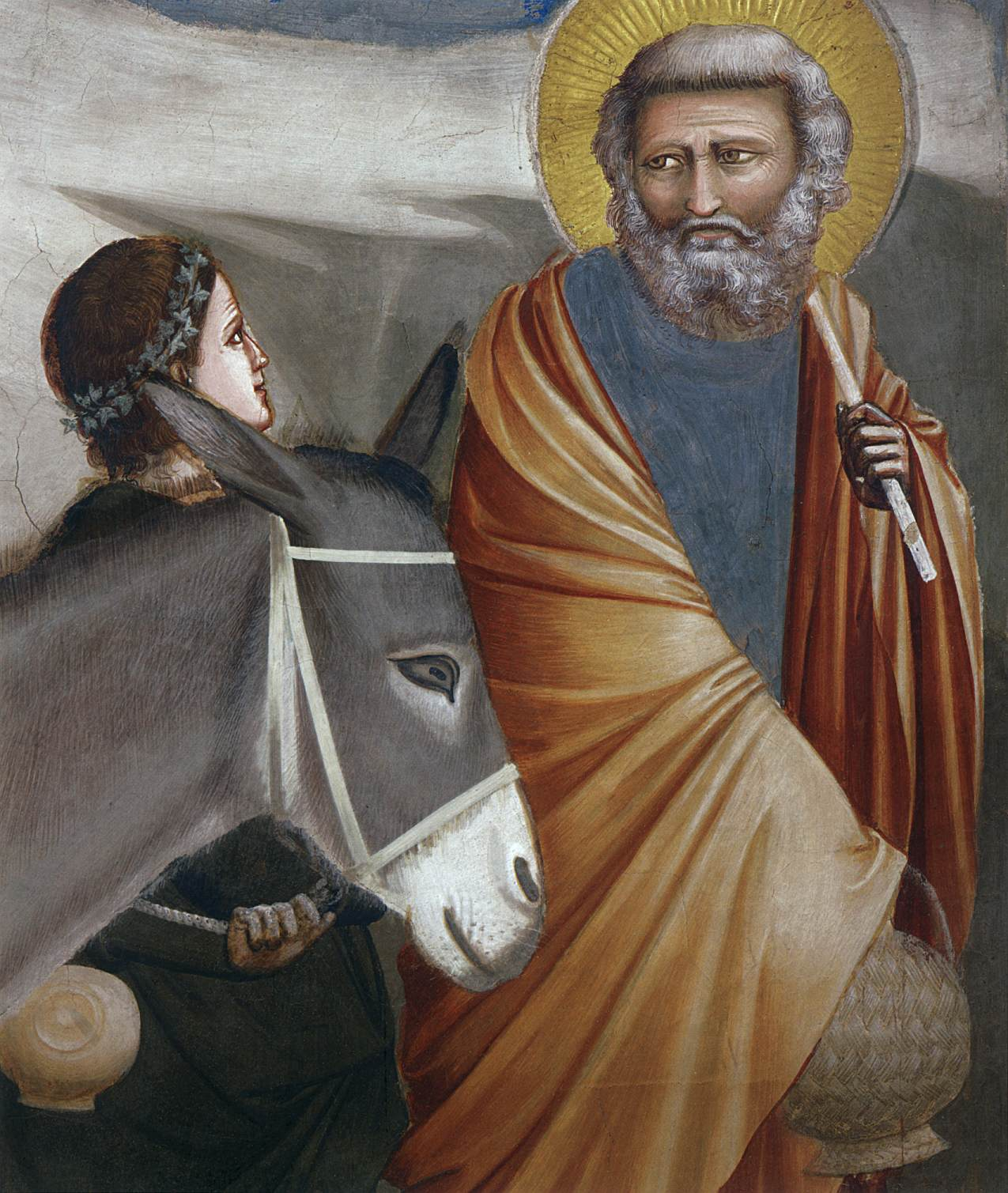 Джота. Уцёкі ў Егіпет. Святы Іосіф